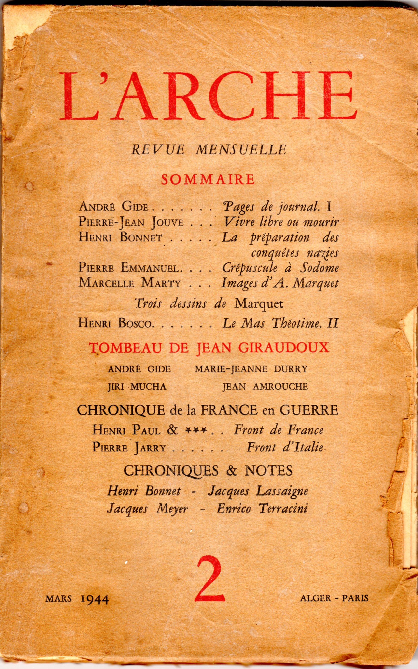 Couverture du numéro deux de la revue L'Arche, publié en mars 1944